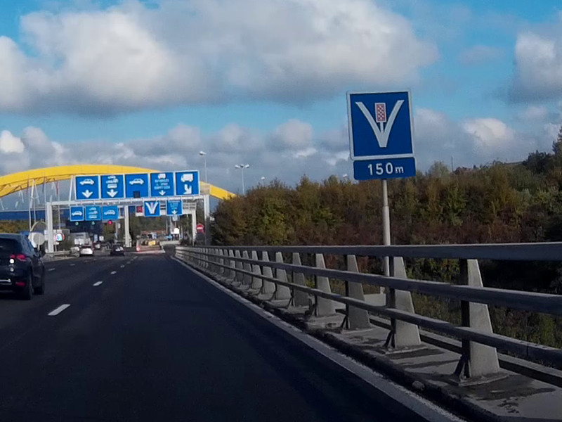 Panneau routier français fusionnant C26a et C26b.